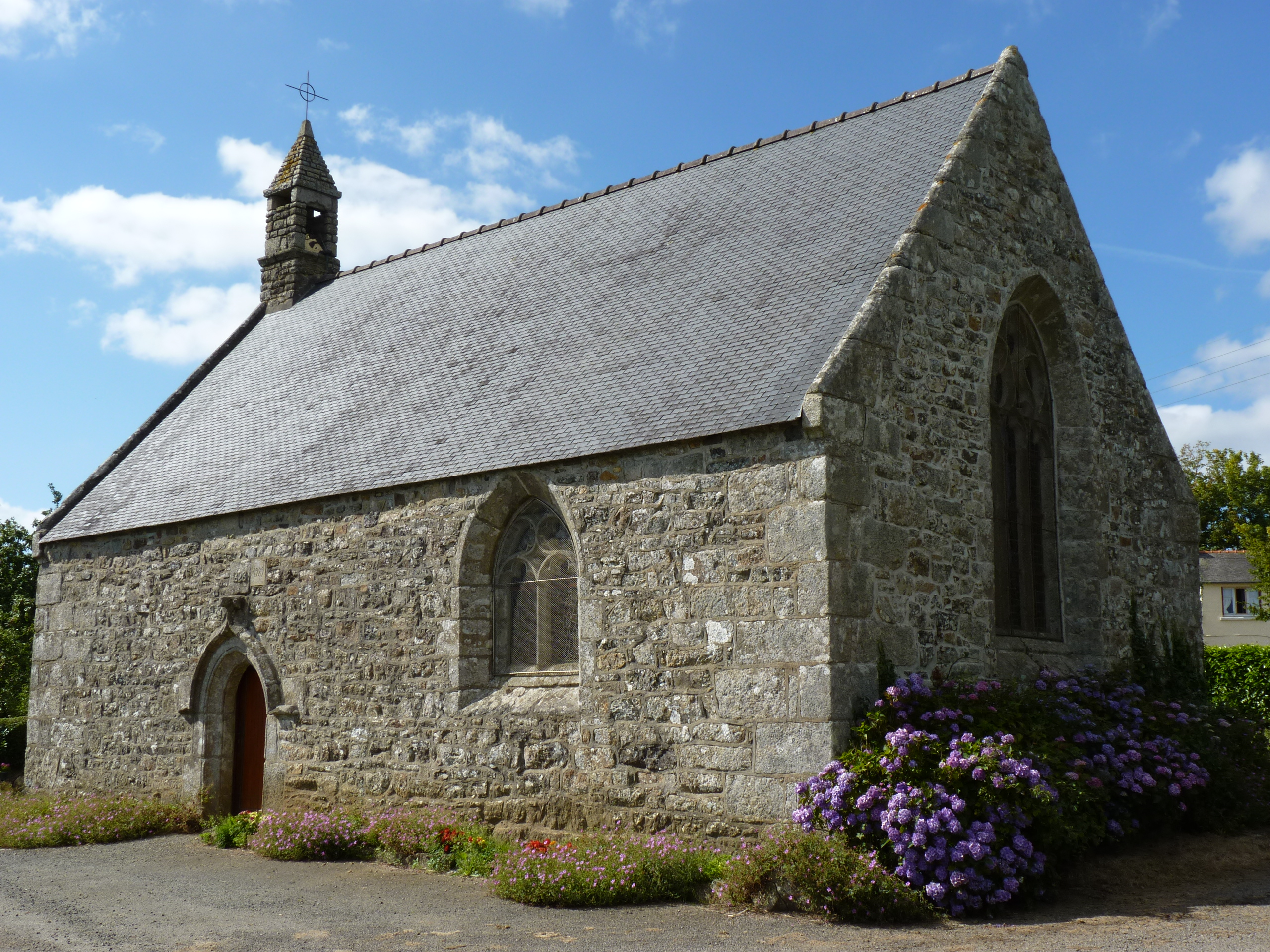 Chapelle Saint-Guénolé proche de l'entrée du bourg de Plourac'h. 16ème siècle (travaux effectués en 1828 et 1989).